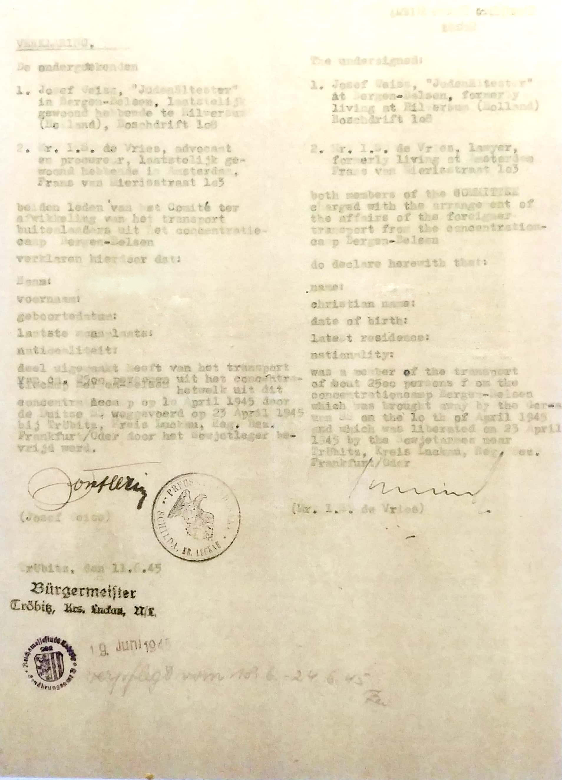 תעודת הזהות שהונפקה על ידי יוסף וייס ויצחק דה פריס בטרביץ בתחילת שנת 1945